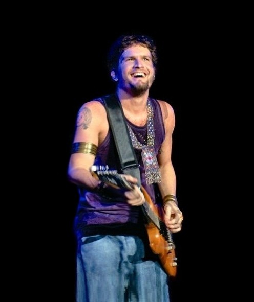 Banda Eva com Saulo Fernandes canta em 2005.